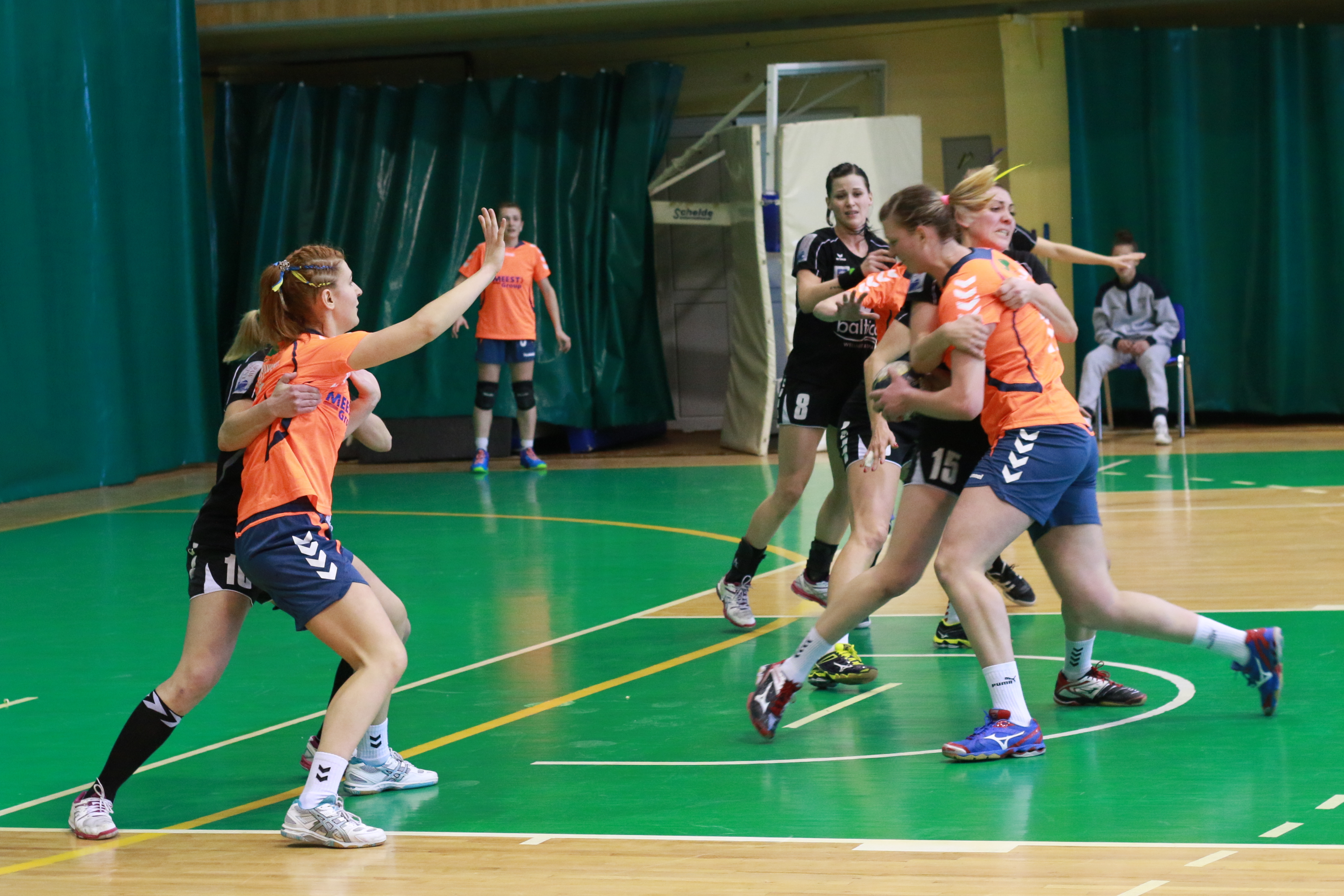 Гандбольний матч між командами Галичанка (Львів, Україна) і Погонь Балтика (Щецін, Польща)